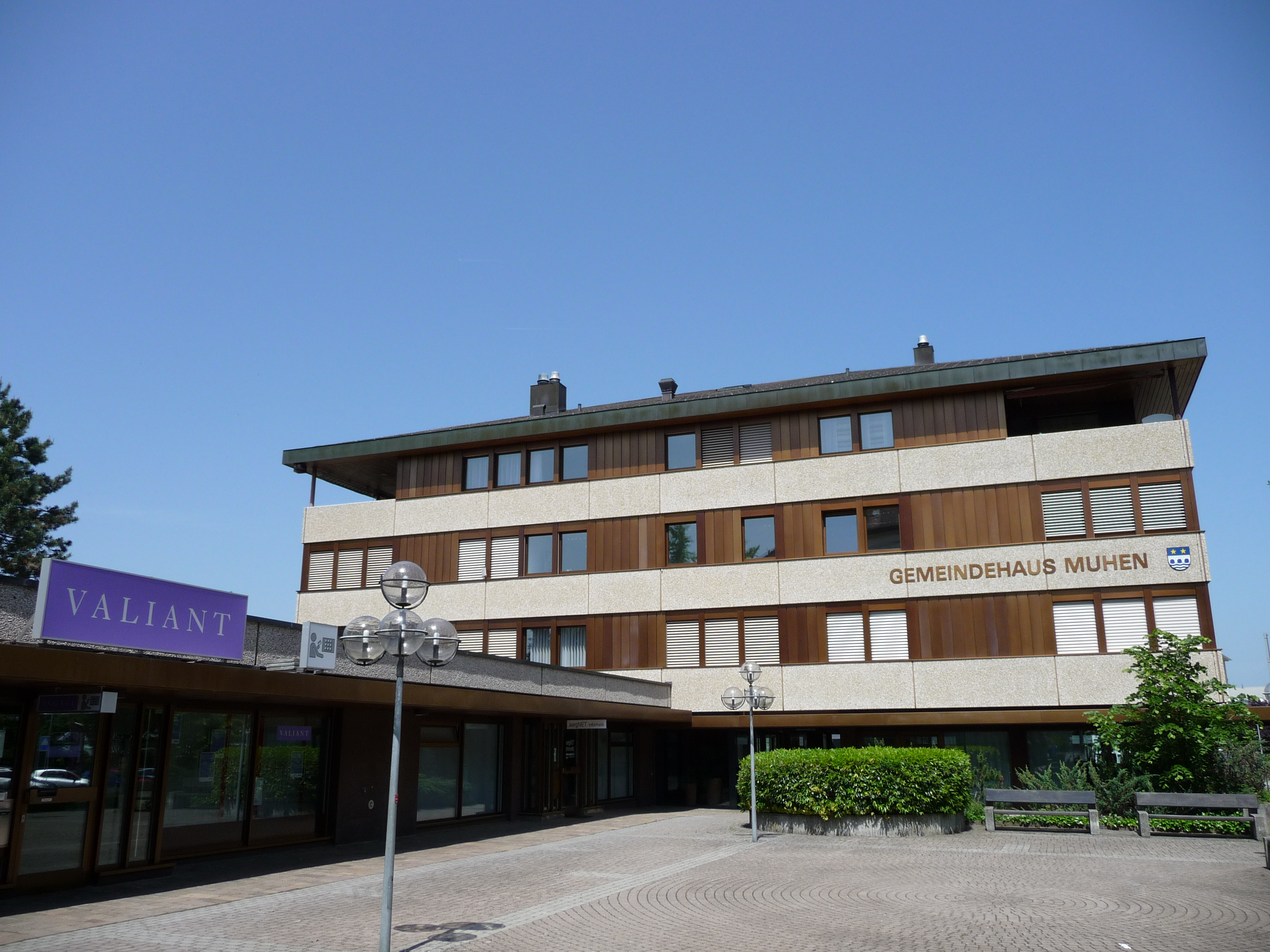 Muhen